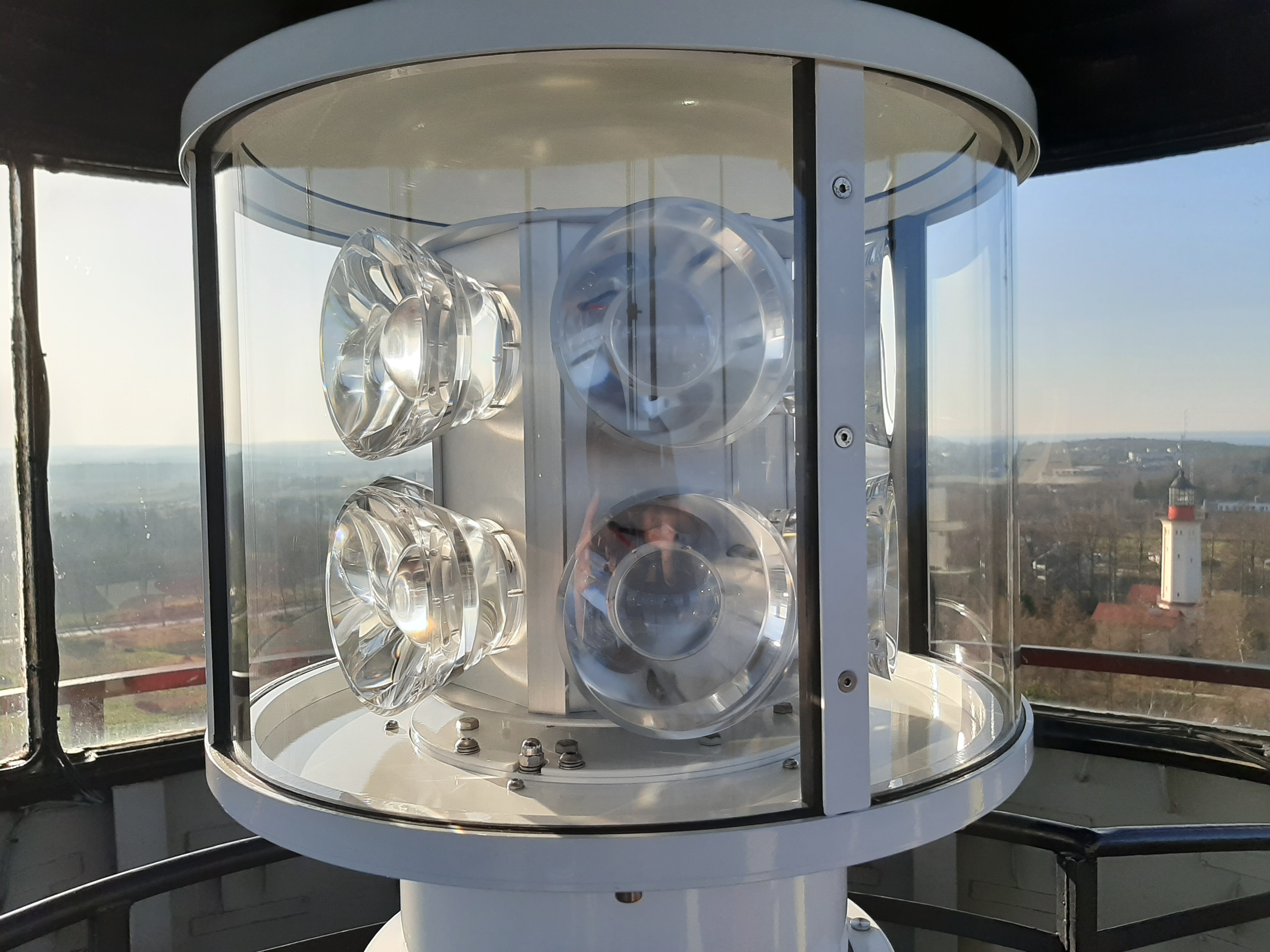 Nowe, diodowe źródło światła, funkcjonujące od listopada 2019 roku.